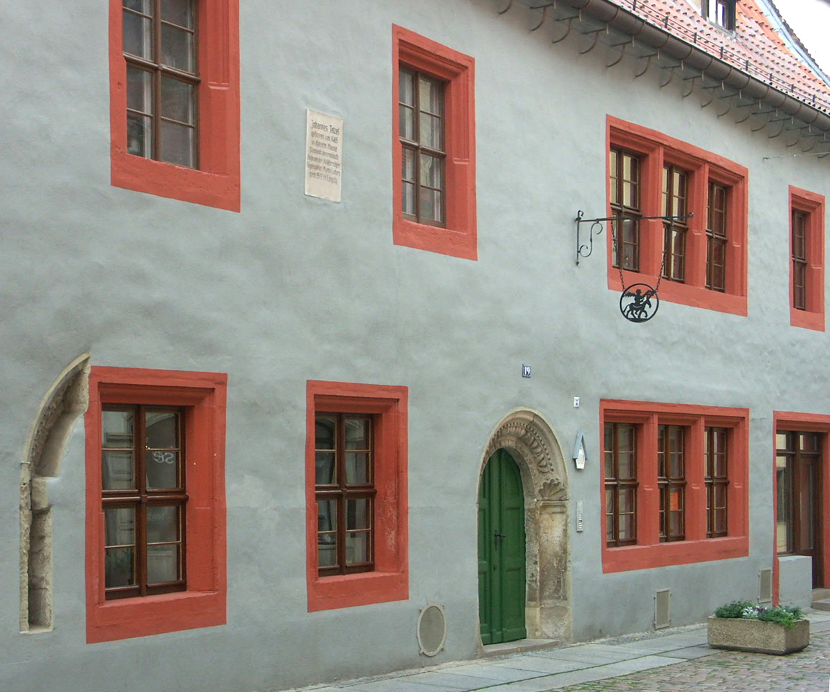 Johann Tetzels Geburtshaus in Pirna